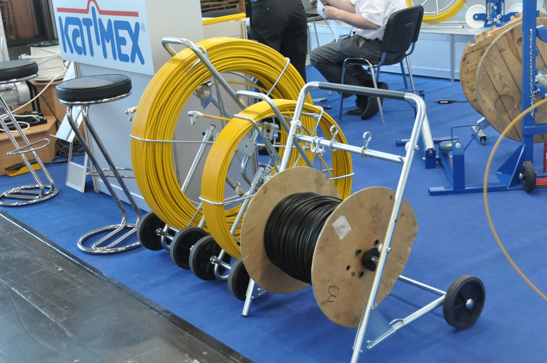 Hannover-Messe April 2012 Dieses Foto entstand durch die Mithilfe des gemeinnützigen Vereins Skillshare bei der Akkreditierung als Fotograf. Infos unter skillshare.eu Skillshare e.V. ist ein eingetragener gemeinnütziger Verein zur Förderung der Bildung durch Unterstützung der Erstellung, Sammlung und Verbreitung so genannten freien Wissens. IBAN: DE16 8306 5408 0004 8850 66 BIC: GENODEF1SLR Bank: VR-Bank Altenburger Land